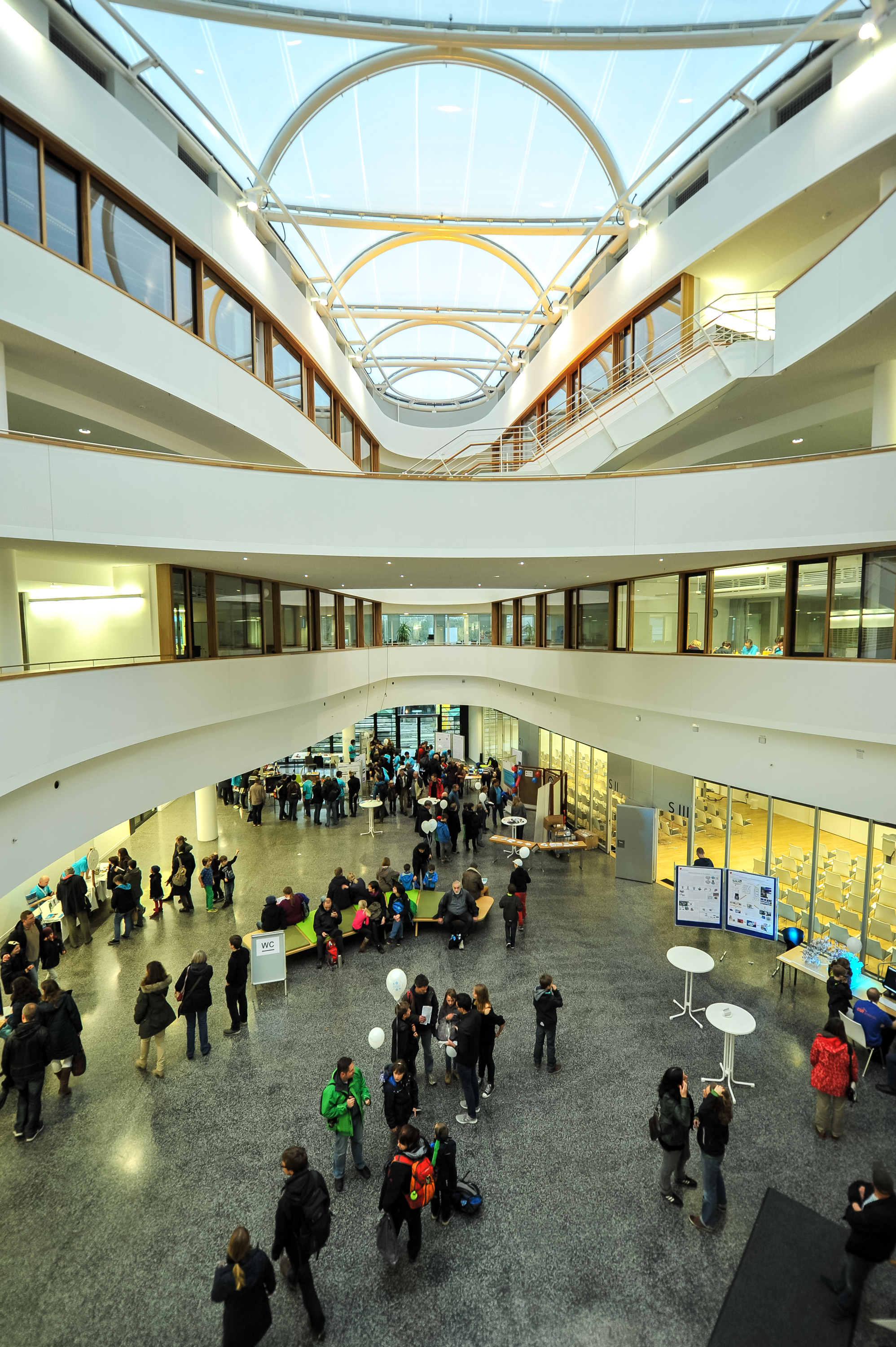 Center for Free-Electron Laser Science (CFEL), Deutsches Elektronen-Synchrotron (DESY) in Hamburg